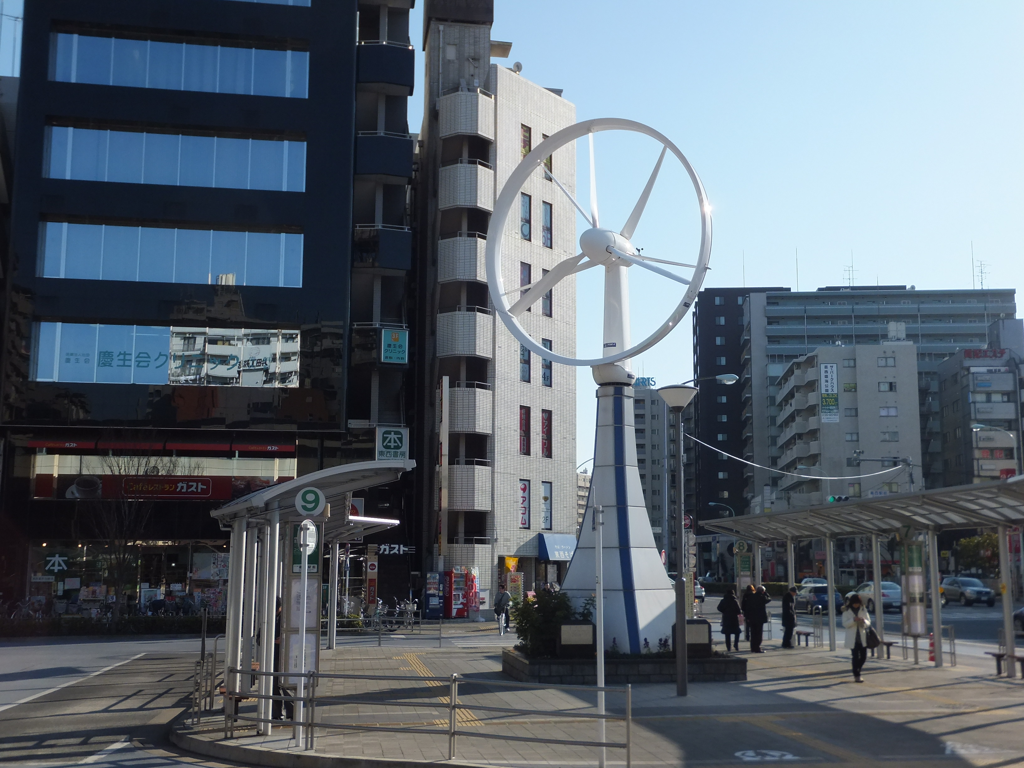 東京メトロ東西線葛西駅東口駅前広場